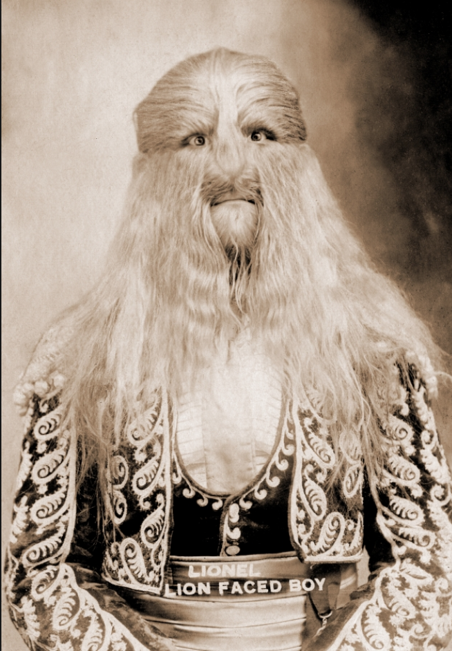 Portrait_Costume de scène